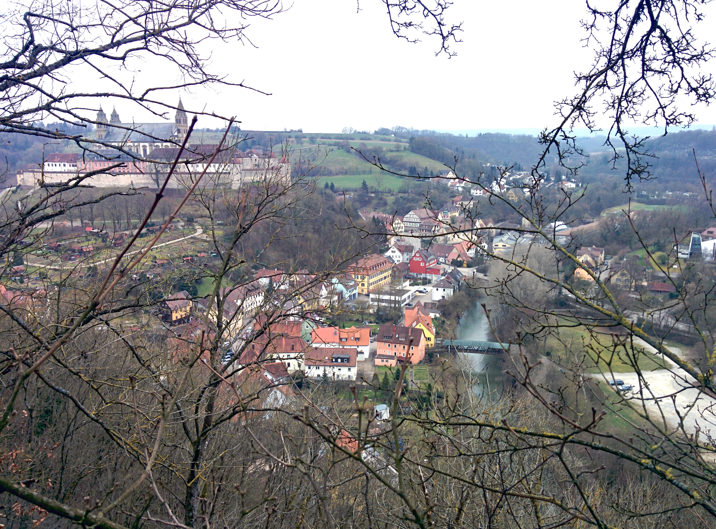 Blick südwärts von der Hangkante des Sporns der Limpurg bei Schwäbisch Hall-Oberlimpurg auf Schwäbisch Hall-Steinbach. Links im Bild die Comburg auf dem Umlaufberg einer aufgelassenen Flusschlinge des Kochers, der im Bild nach vorne fließt.